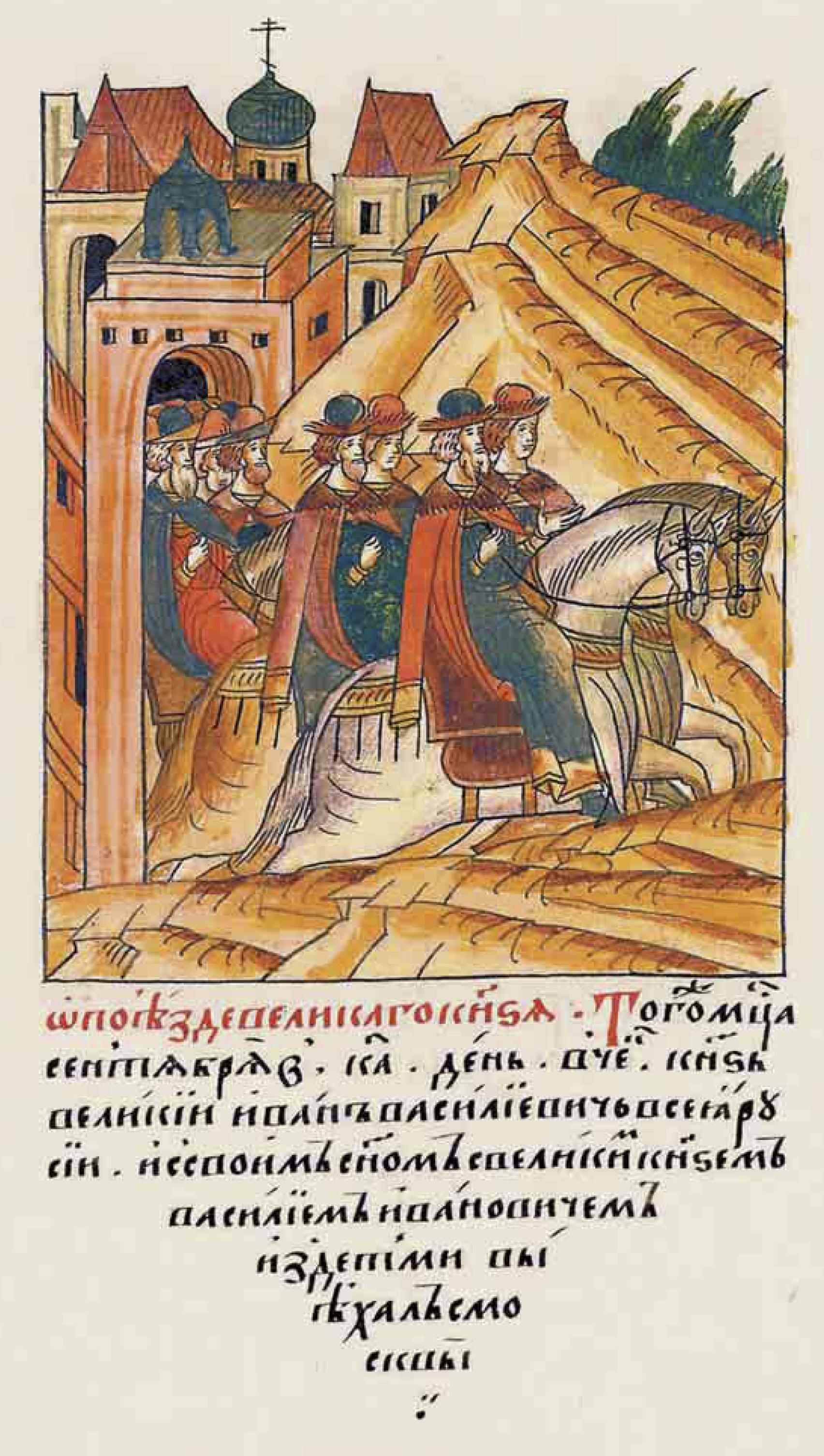 О поезде великого князя. В том же меся- це сентябре в 21 день в четверг великий князь всея Руси Иван Васильевич со своим сыном великим кня- зем Василием Ива- новичем и с детьми выехал из Москвы